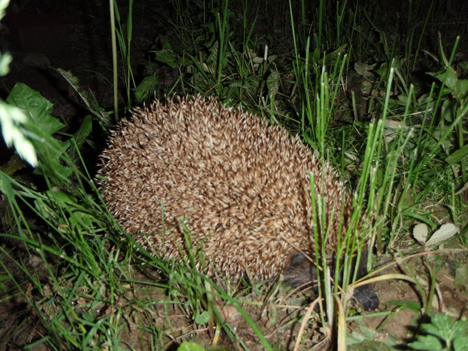 Їжак: Їжак, Україна, Прикарпаття, м.Моршин